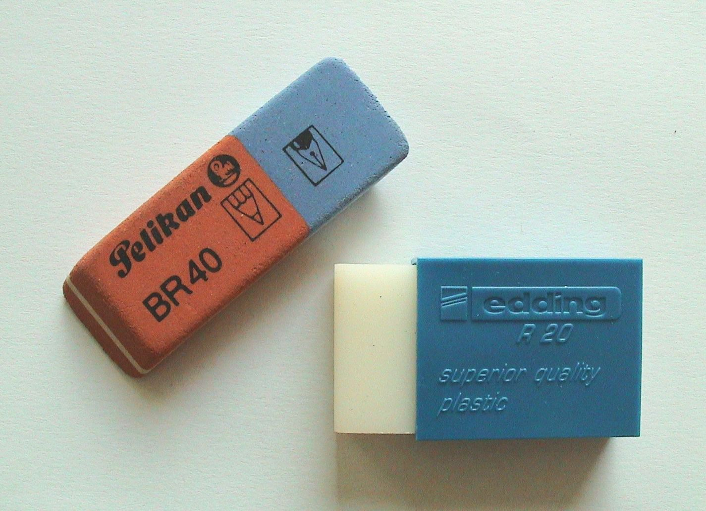 Verschiedene Radiergummies: Pelikan BR 40, edding R 20